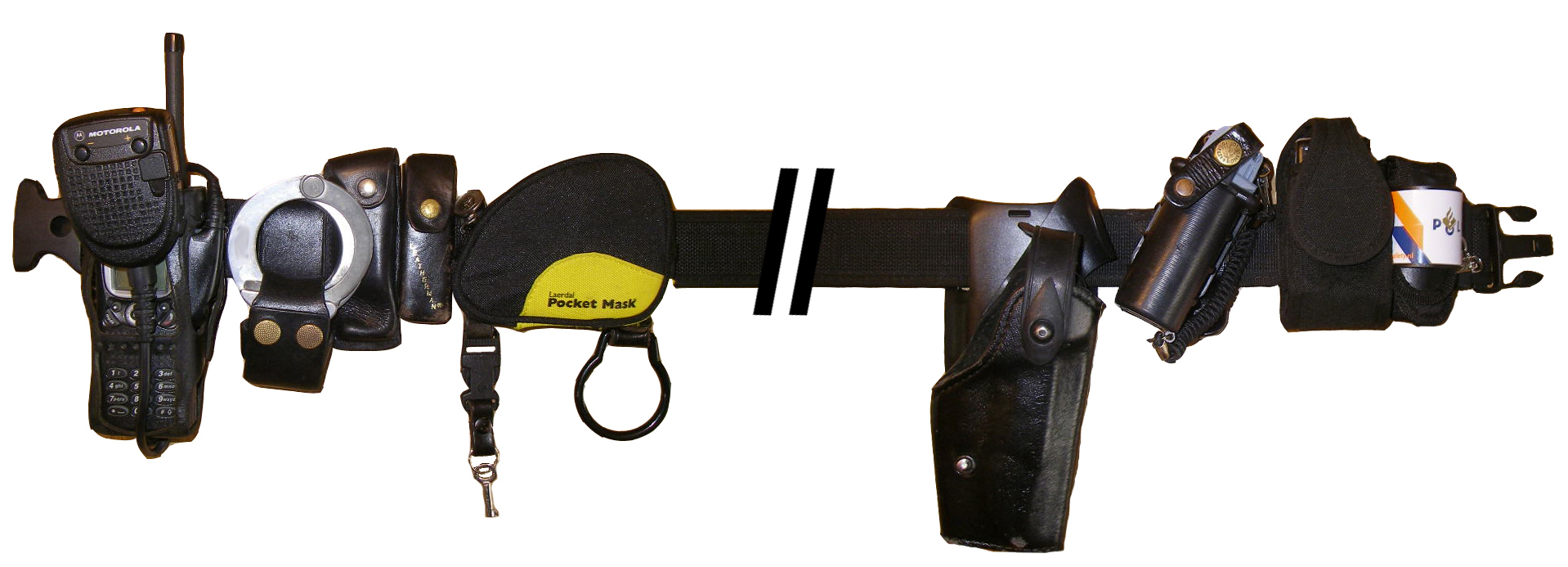 Politiekoppel met VLNR: Portofoon, transportboeien, patroonhouder (extra kogels), multitool, transportboei sleutels, tasje met reanimatiemasker en 2 paar handschoenen, zaklamp ring, holster, pepperspray, mobiele telefoon, LED-zaklampje met daaroverheen een deurklem, sleutelhanger (niet zichtbaar)